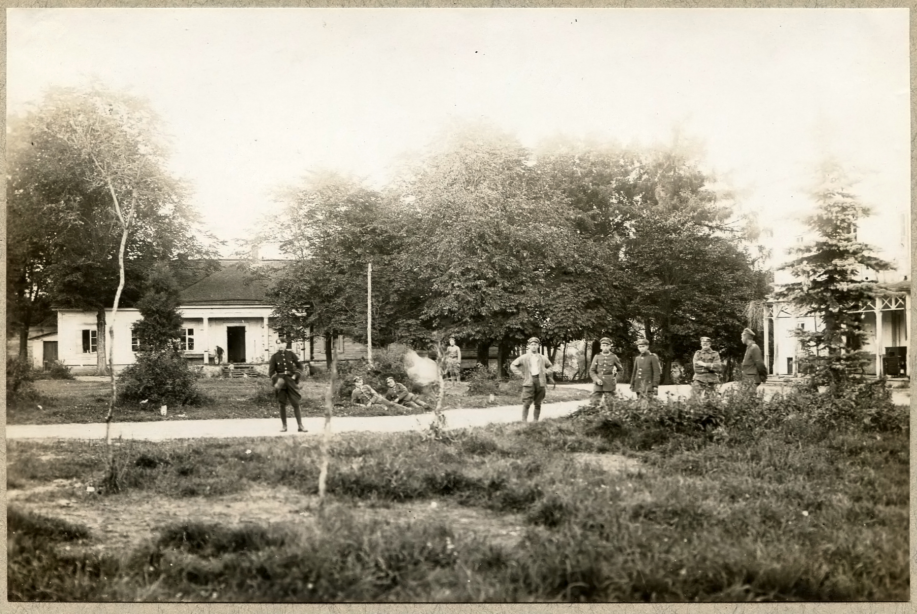 Беларуская (тарашкевіца): Менск (Miensk), Сьляпянка Вялікая (Ślapanka Vialikaja): сядзіба Ваньковічаў (Vańkovič). Афіцына